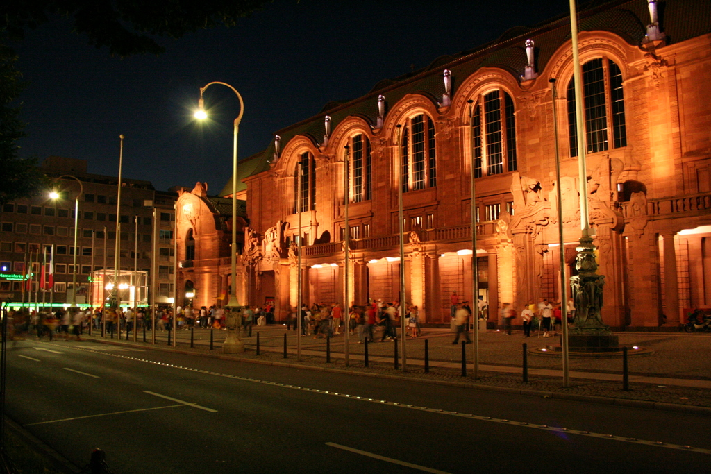 Bild der Fassade des Rosengarten bei Nacht